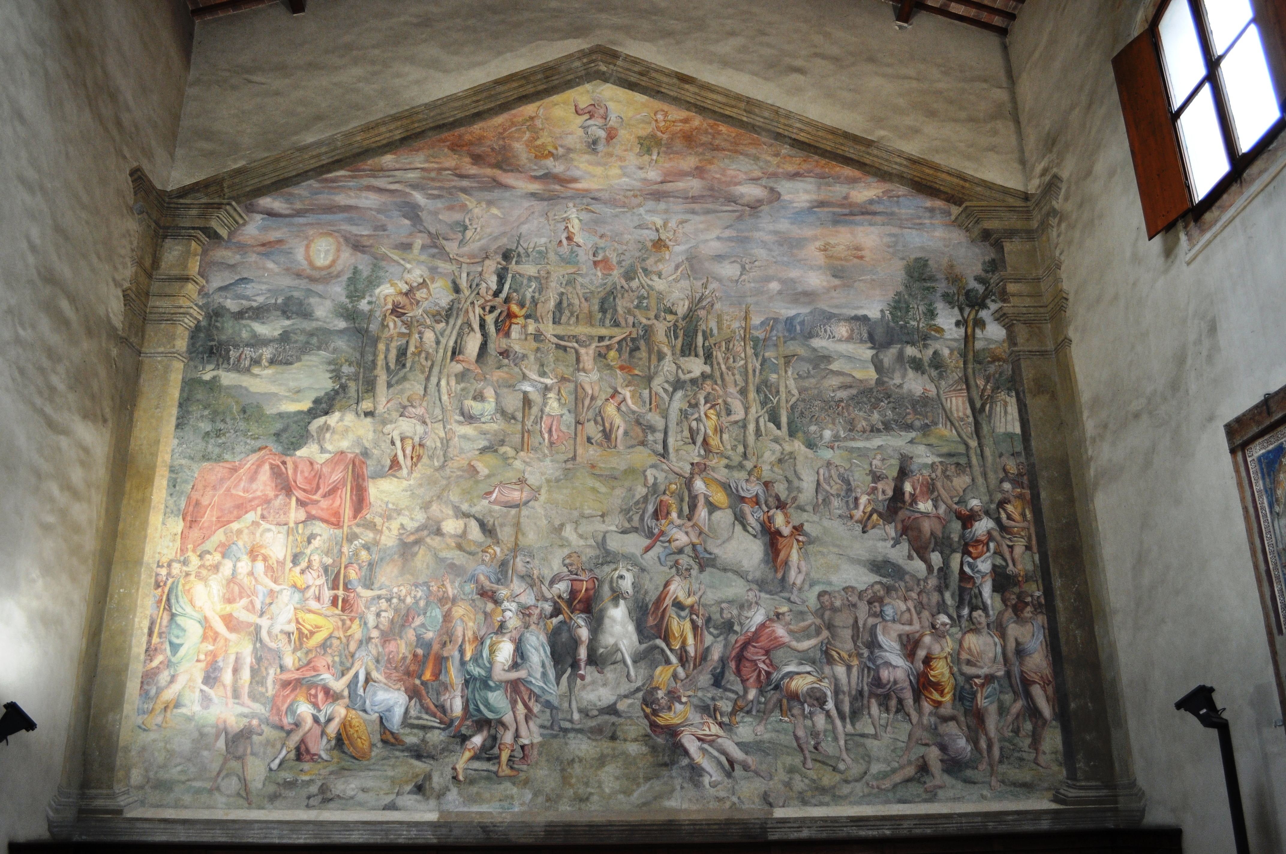 Ex Oratorio di San Desiderio - MIBAC This is a photo of a monument which is part of cultural heritage of Italy.